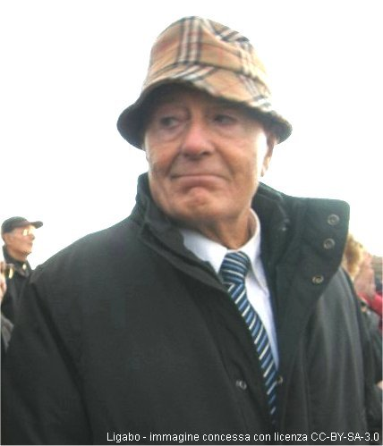 Mino Milani a Medole nel 2008